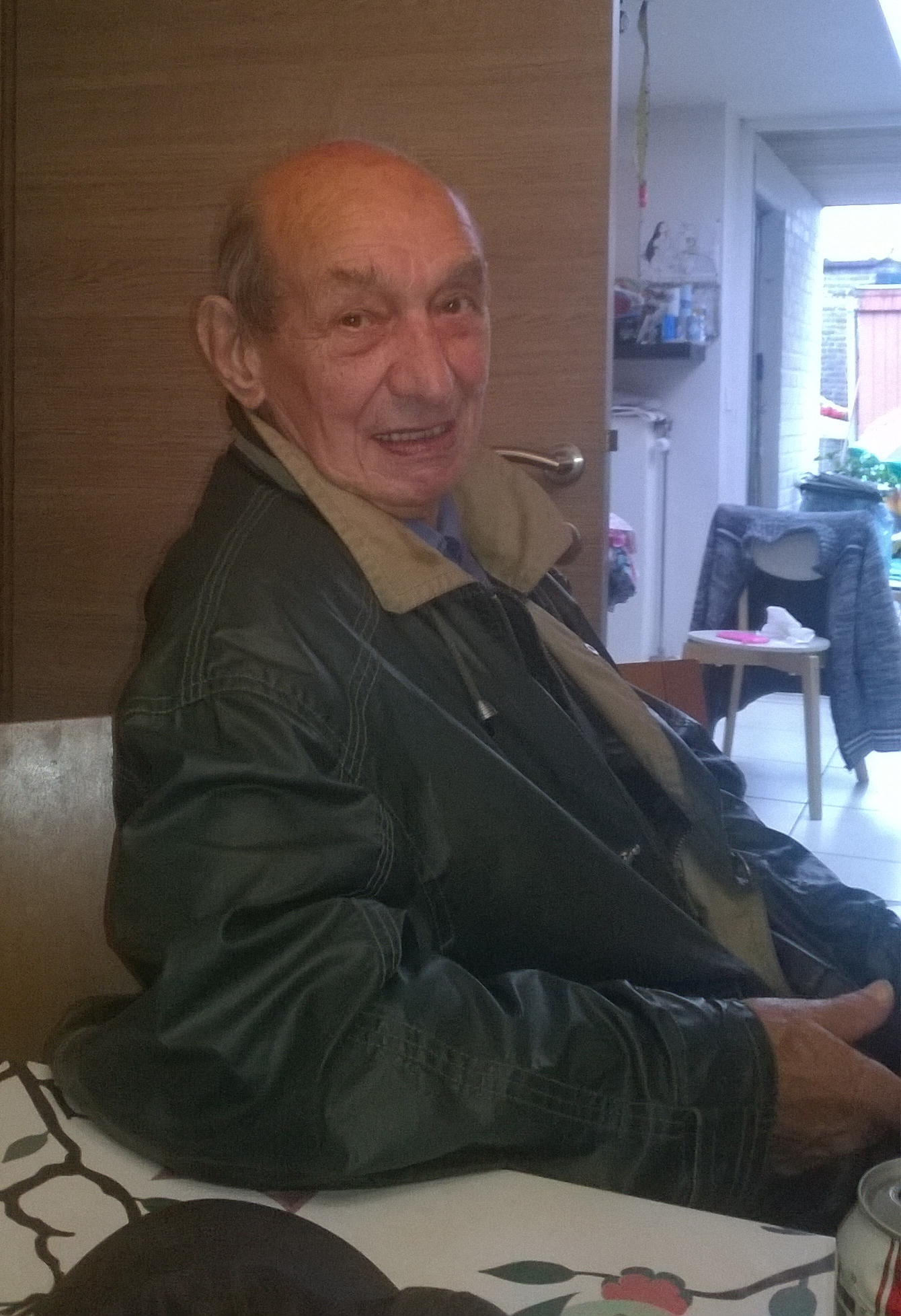 Henri De Wolf (wielrenner)